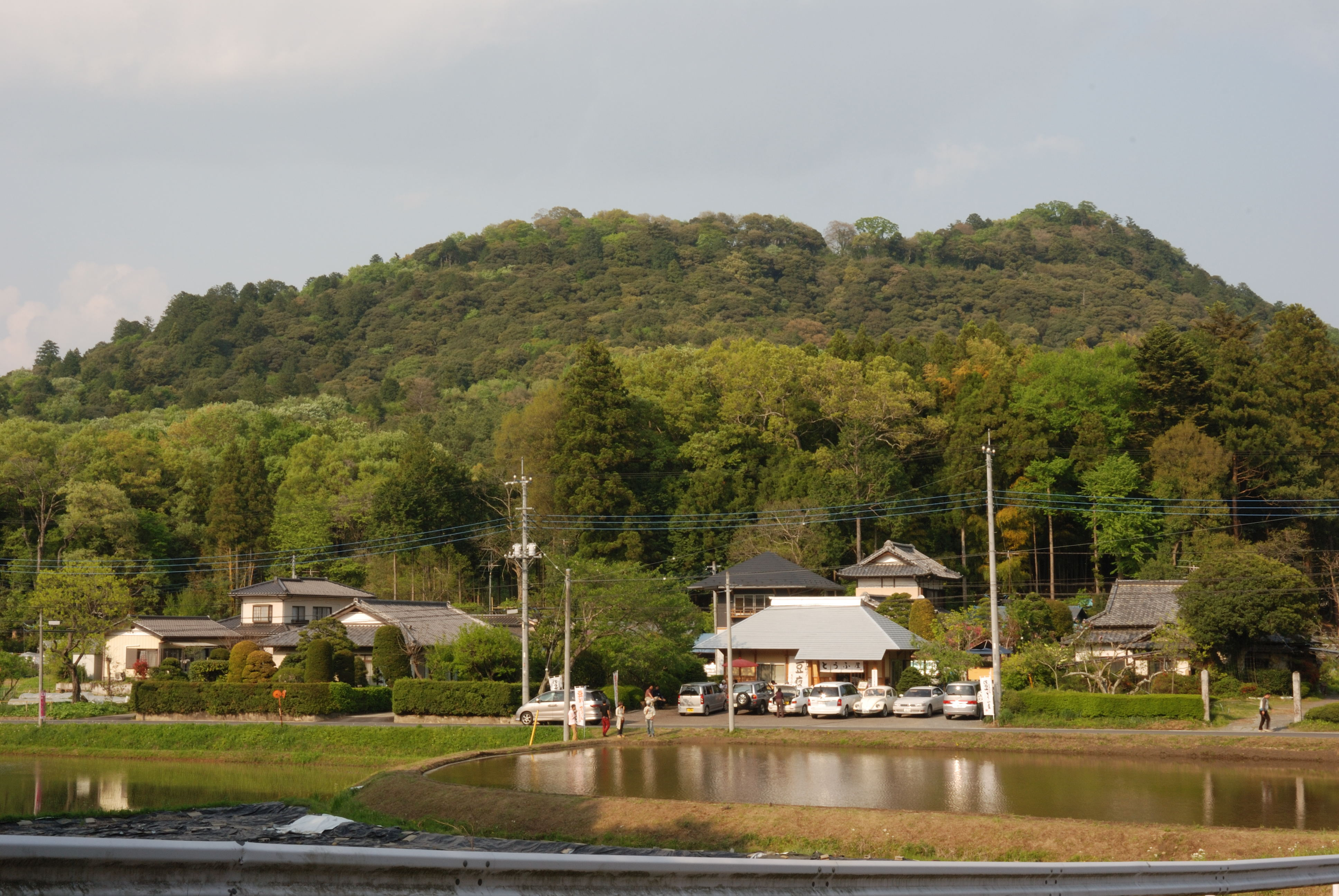 Kasama castle